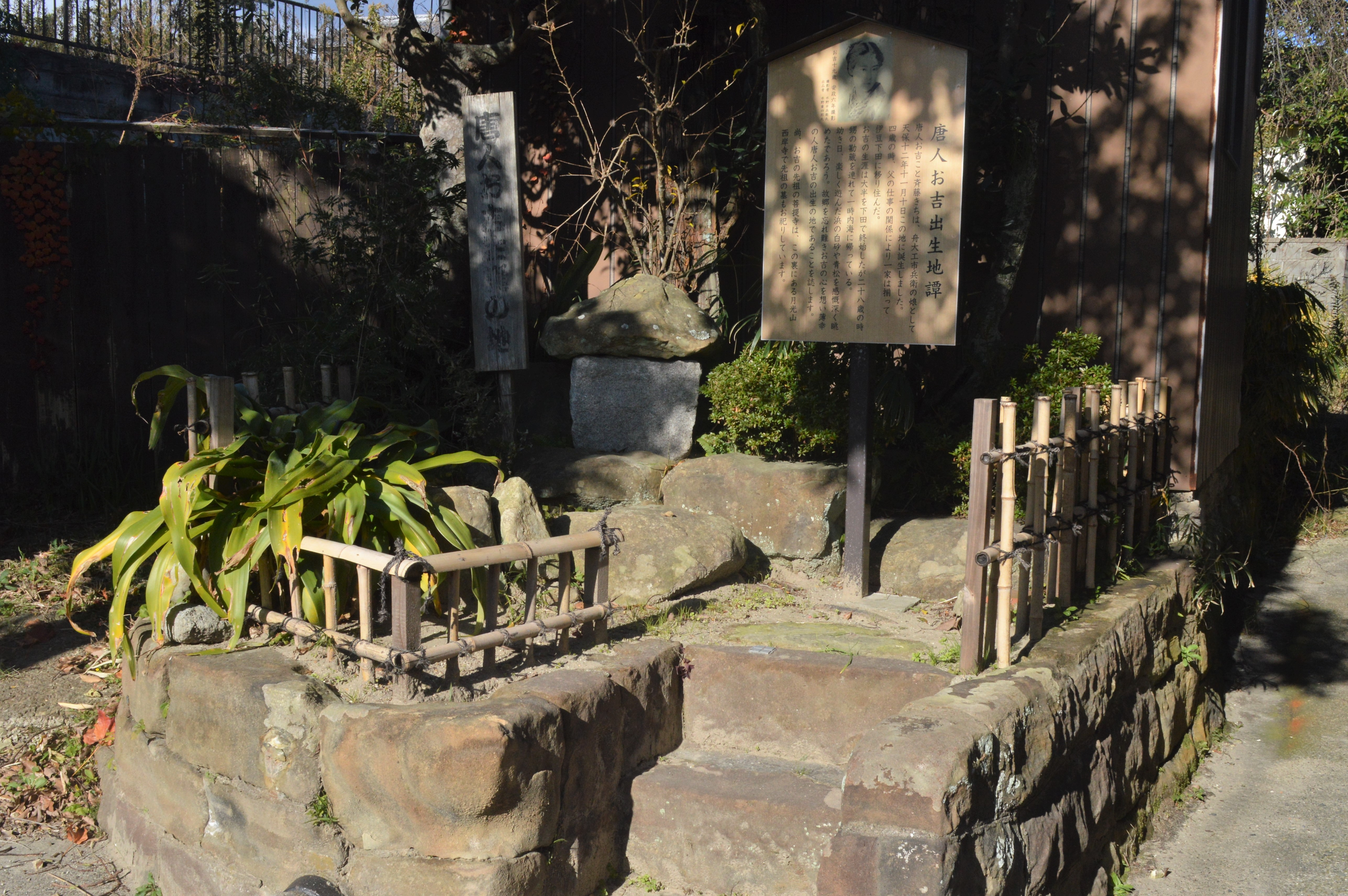 愛知県知多郡南知多町にある「唐人お吉出生地碑」。唐人お吉こと斎藤きちの出生地。